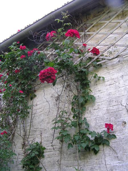 american pilar